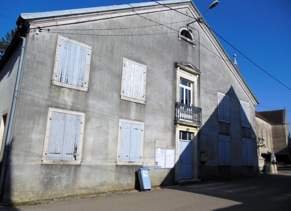 Photographie de la mairie de Montmirey-la-Ville (39), Rue Alexis Millardet.